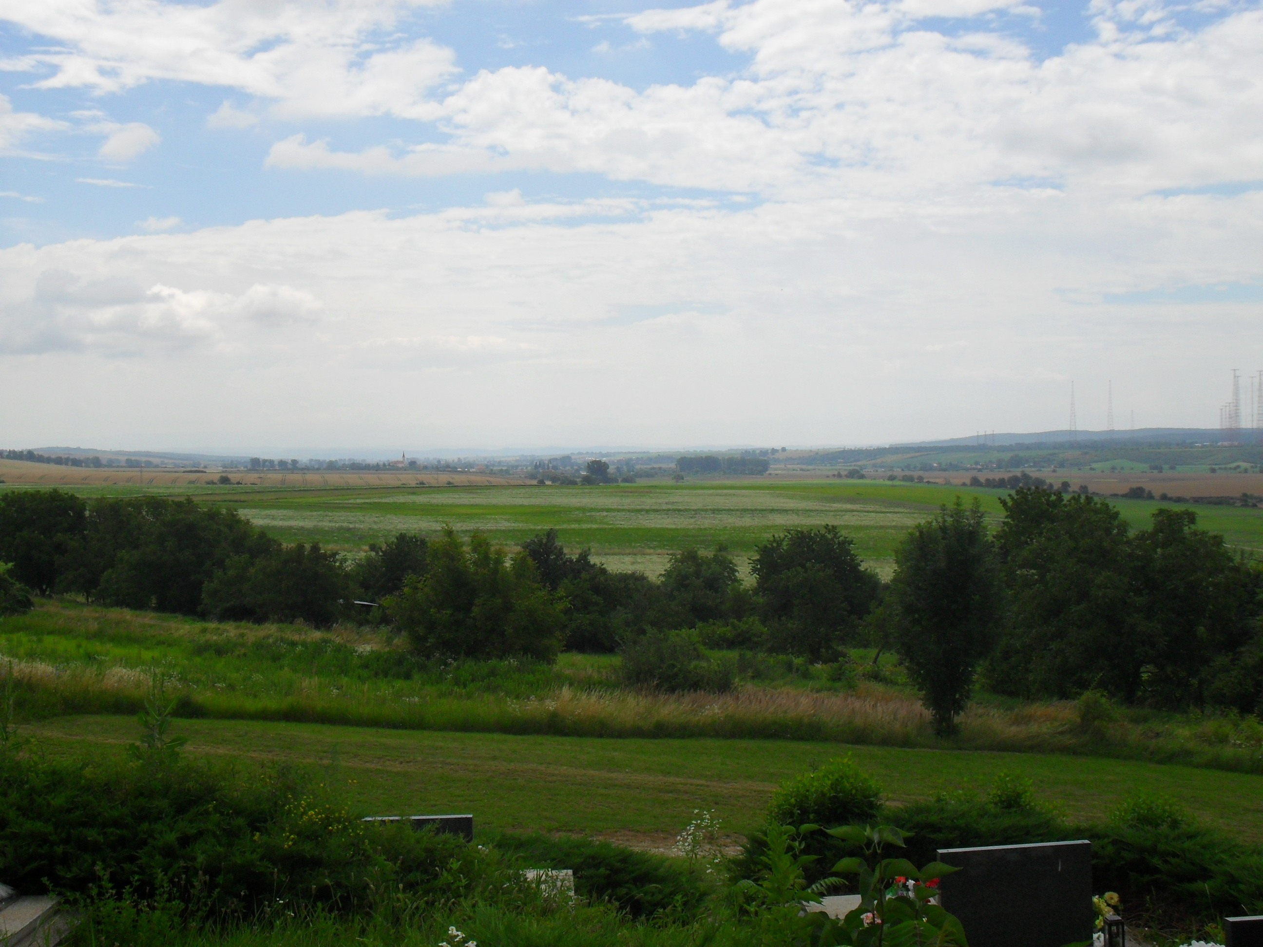 Nagybalog - kilátás a templomdombról dél felé (a háttérben Uzapanyit)